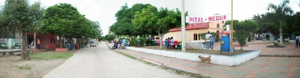 Vista de la Plaza Principal de Pital Megua